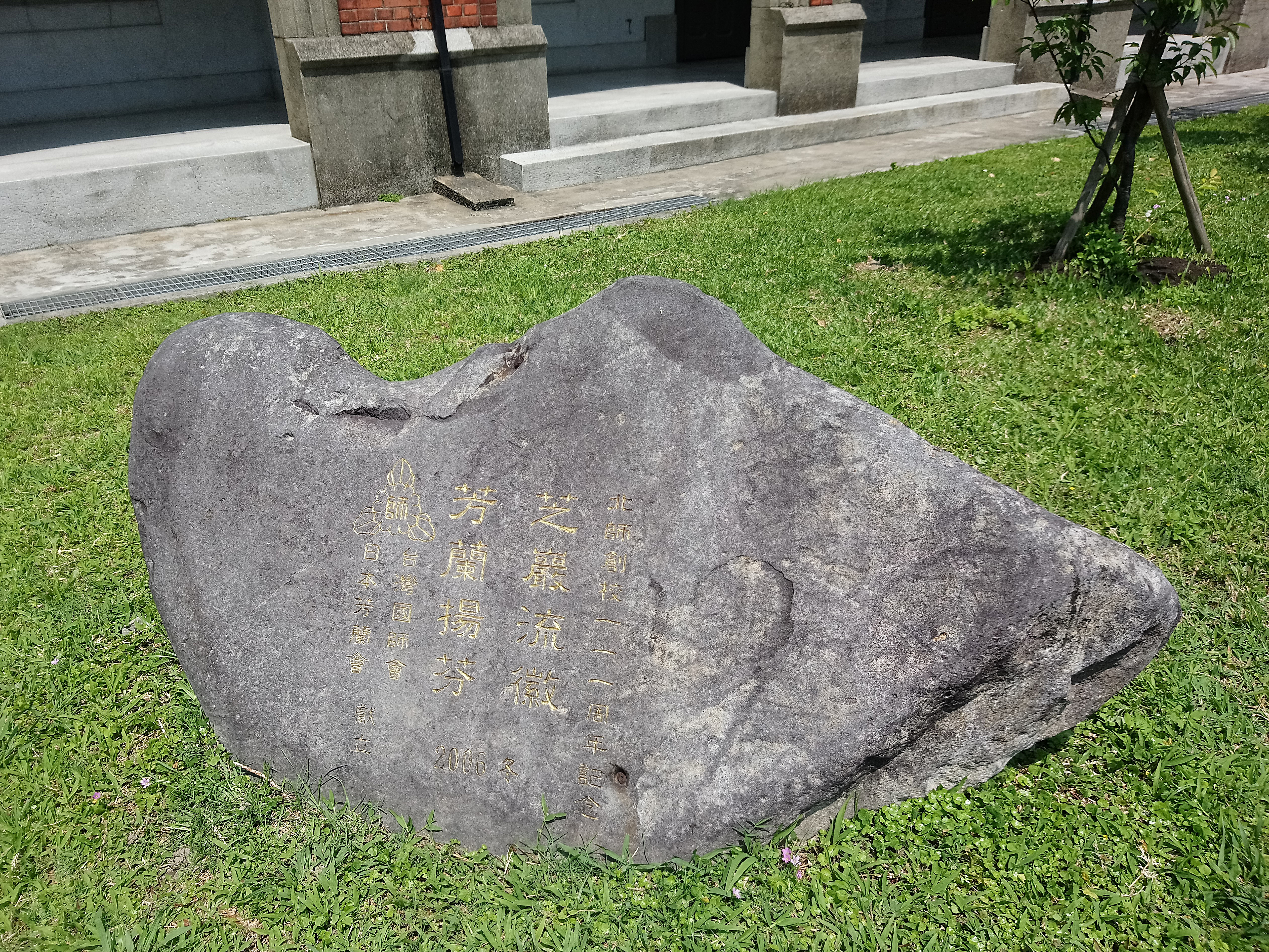 國立臺北教育大學「芝巖流徽，芳蘭揚芳」石碑,臺北市大安區大安區臥龍次分區臥龍里